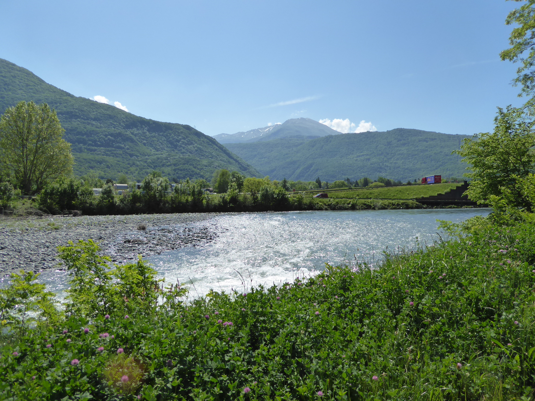 Les berges de La Romanche à Notre Dame de Mésage avec l'Alpe du Grand Serre en arrière-plan